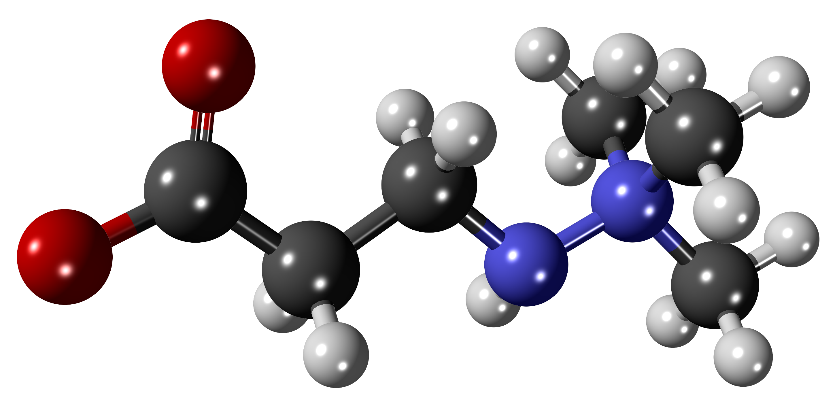 Mildronate